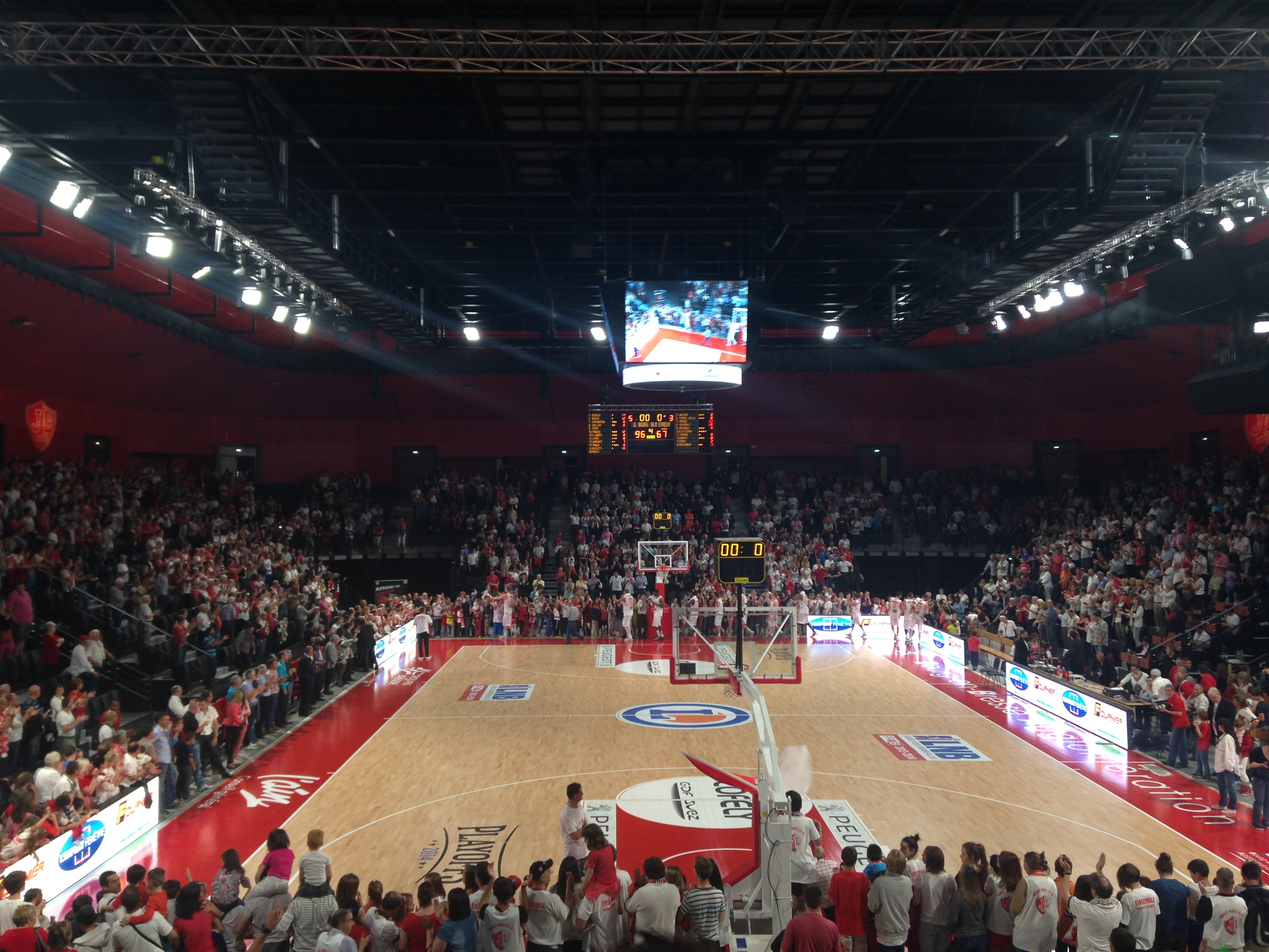 Terrain de basket de la JL Bourg Basket, l'Ekinox, lors de la 1/2 finale aller des play-offs le 20 mai 2014 contre l'ALM Evreux.